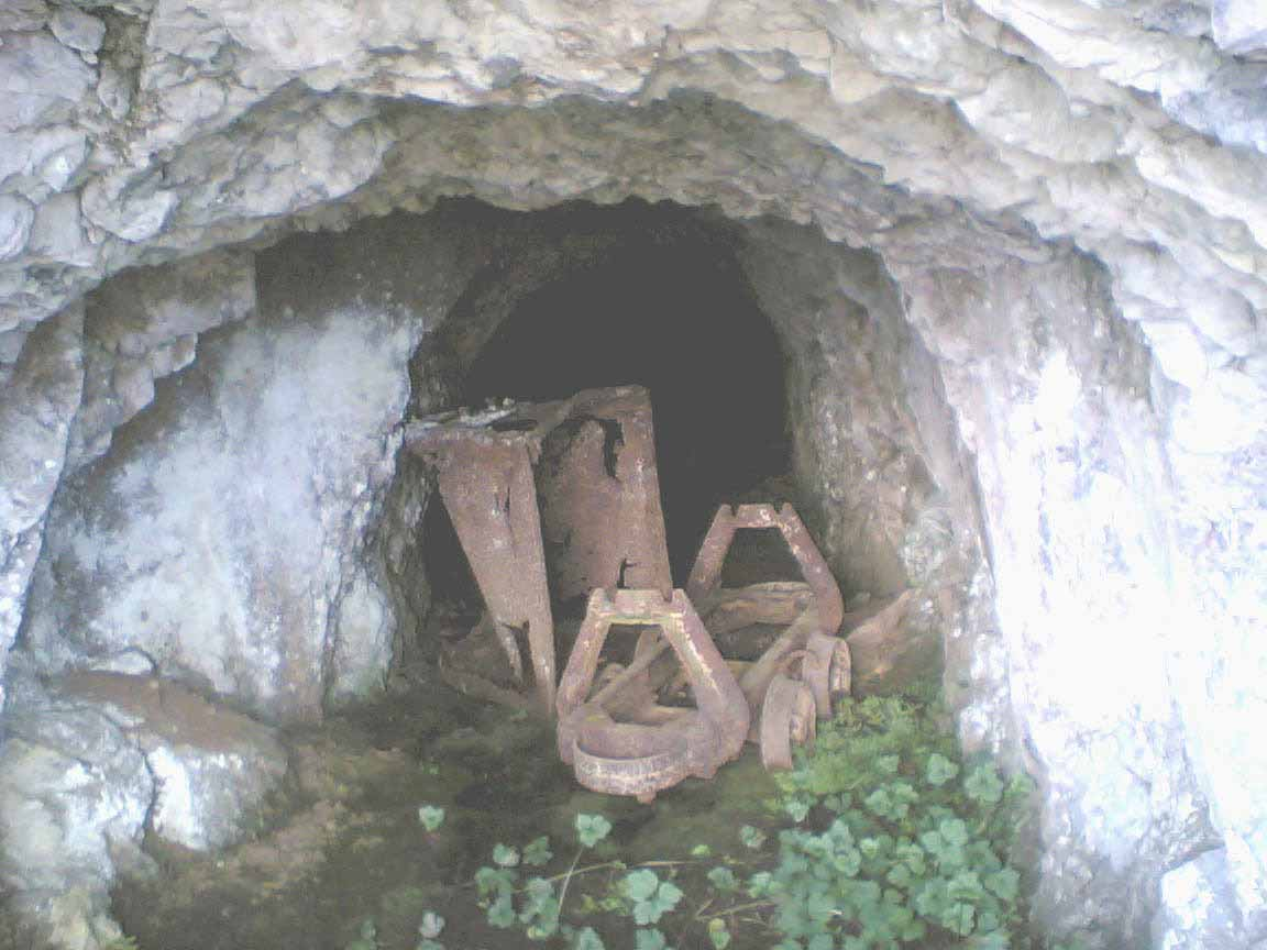 Description/ Descripción: Surroundings of Riosa, Principado de Asturias, Spain. Location of Rioseco mines. Texeo prehistoric mines discovered by Alejandro Van Straalem and operated by The Aramo Cooper Minas Ltd./ Entorno de Riosa, Principado de Asturias, España. Ubicación de las Minas de Rioseco. Minas prehistóricas de Texeo descubiertas por Alejandro Van Straalem y explotadas por The Aramo Cooper Minas Ltd.Minas de hulla explotadas por Ensidesa en la decada de 1960 y actualmente (2006) por HUNOSA Source/ Fuente: Self taken / Autorealizadas o particulares. Date/ Fecha: Novembre 2005/ Noviembre 2005 Publication Date/ Fecha de publicación: January 2006/Enero 2006 Author/ Autor: Photographs provided by Honorino Gonzalez, GRUCOMI and published by Arbeyu/ Facilitadas por Honorino Gonzalez, GRUCOMI y publicadas por Arbeyu.